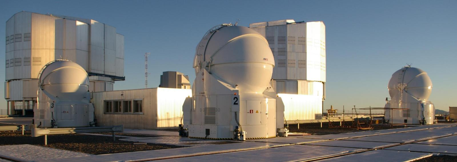 Paranal Observatorium, ATs mit VLTI-Lab